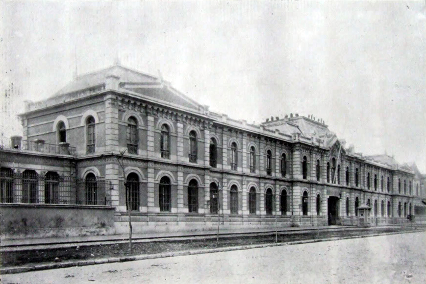 Regimiento Tacna Nº1. Ejército de Chile, Álbum Gráfico de 1910. En con motivo del Centenario de la Independencia de Chile.